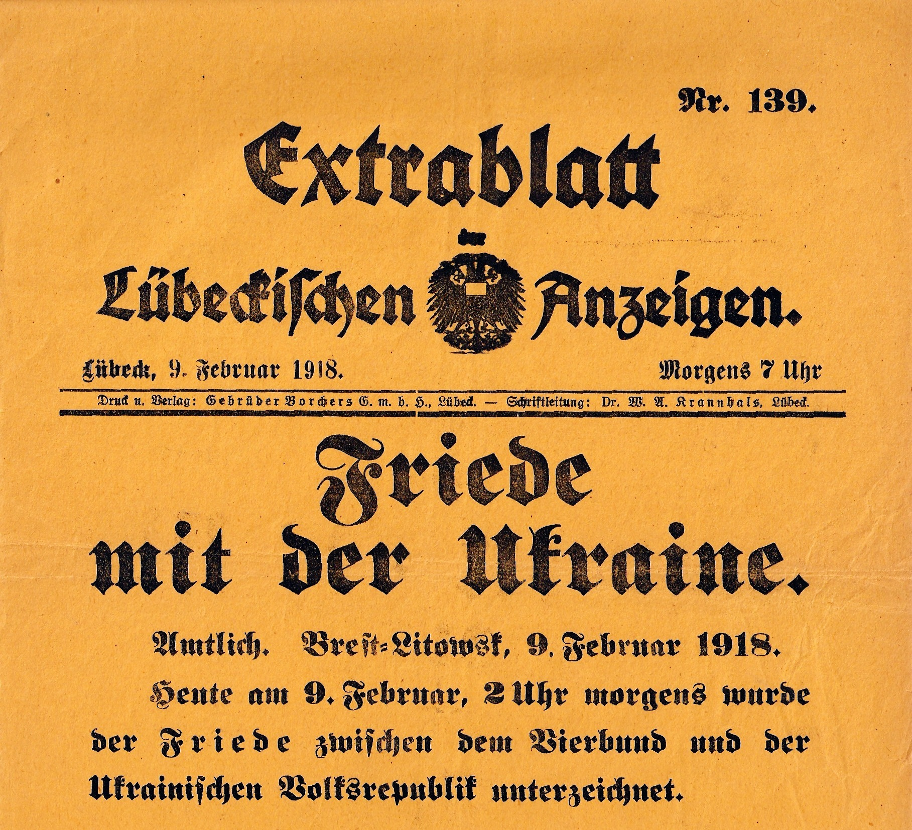 Sonderdepesche: Frieden von Brest-Litowsk